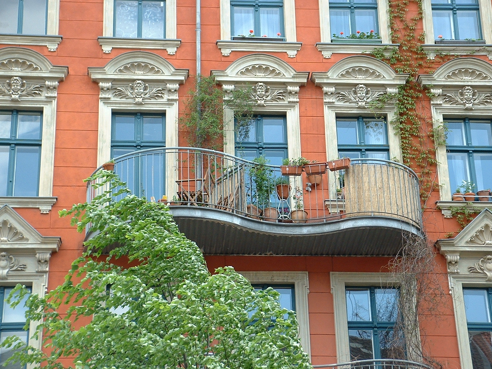 Balkonszene